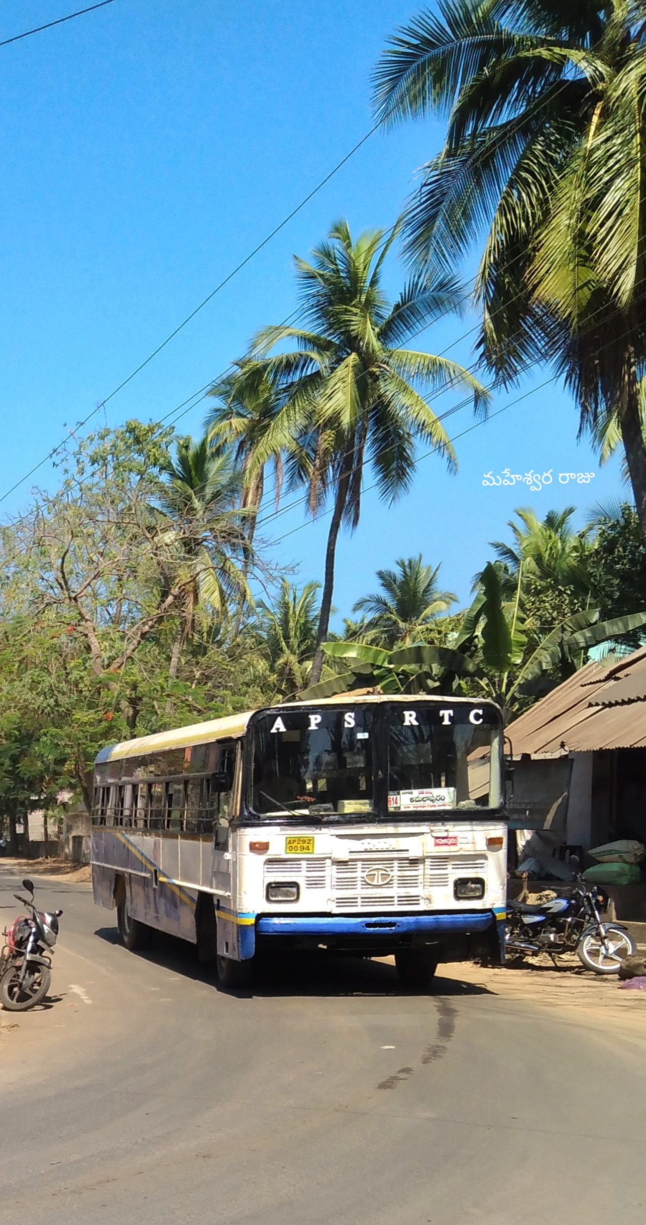 ఉప్పలగుప్తం మండలానికి రవాణా సౌకర్యం బస్సు వస్తున్న చిత్రం